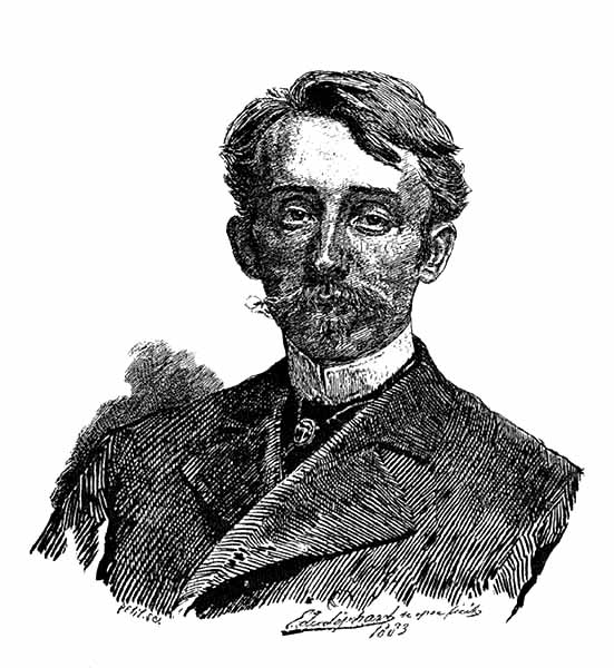 Lipgart E. K. self-portrait